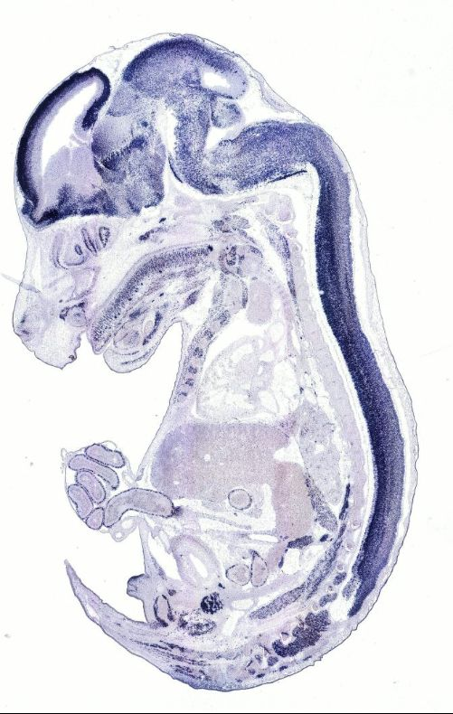 Expressionsmuster des Gens "Cannabinoidrezeptor Typ 1" (Cnr1) im Mausembryo